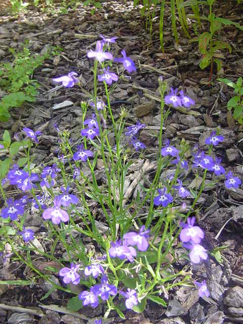 Lobelia erinus